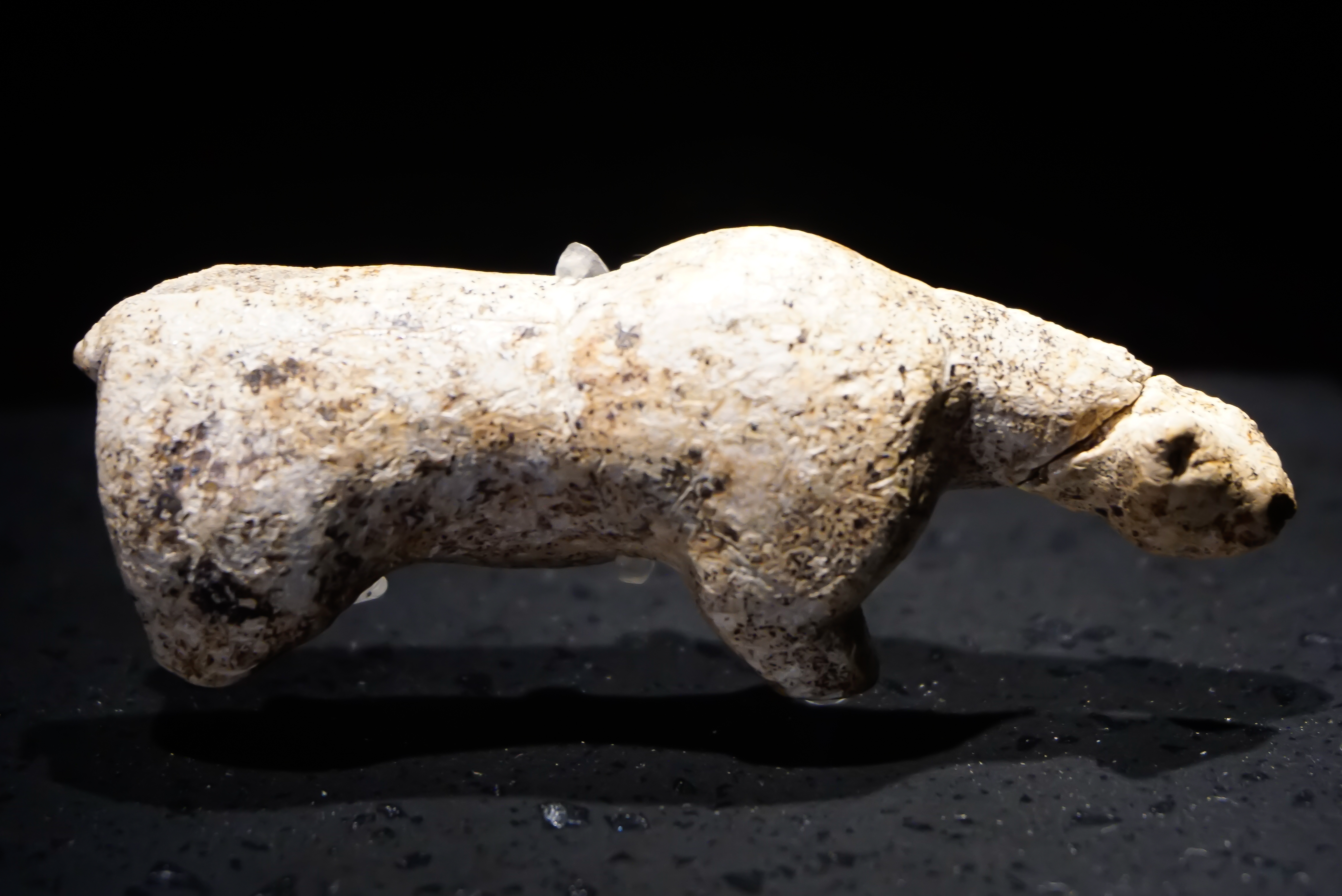 MUT: Museum der Universität Tübingen - Alte Kulturen - Sammlungen im Schloss Hohentübingen: Sammlung der Älteren Urgeschichte des Museums der Universität Tübingen - Tierplastik aus Mamutelfenbein, Vogelherdhöhle, etwa 40.000 Jahre alt